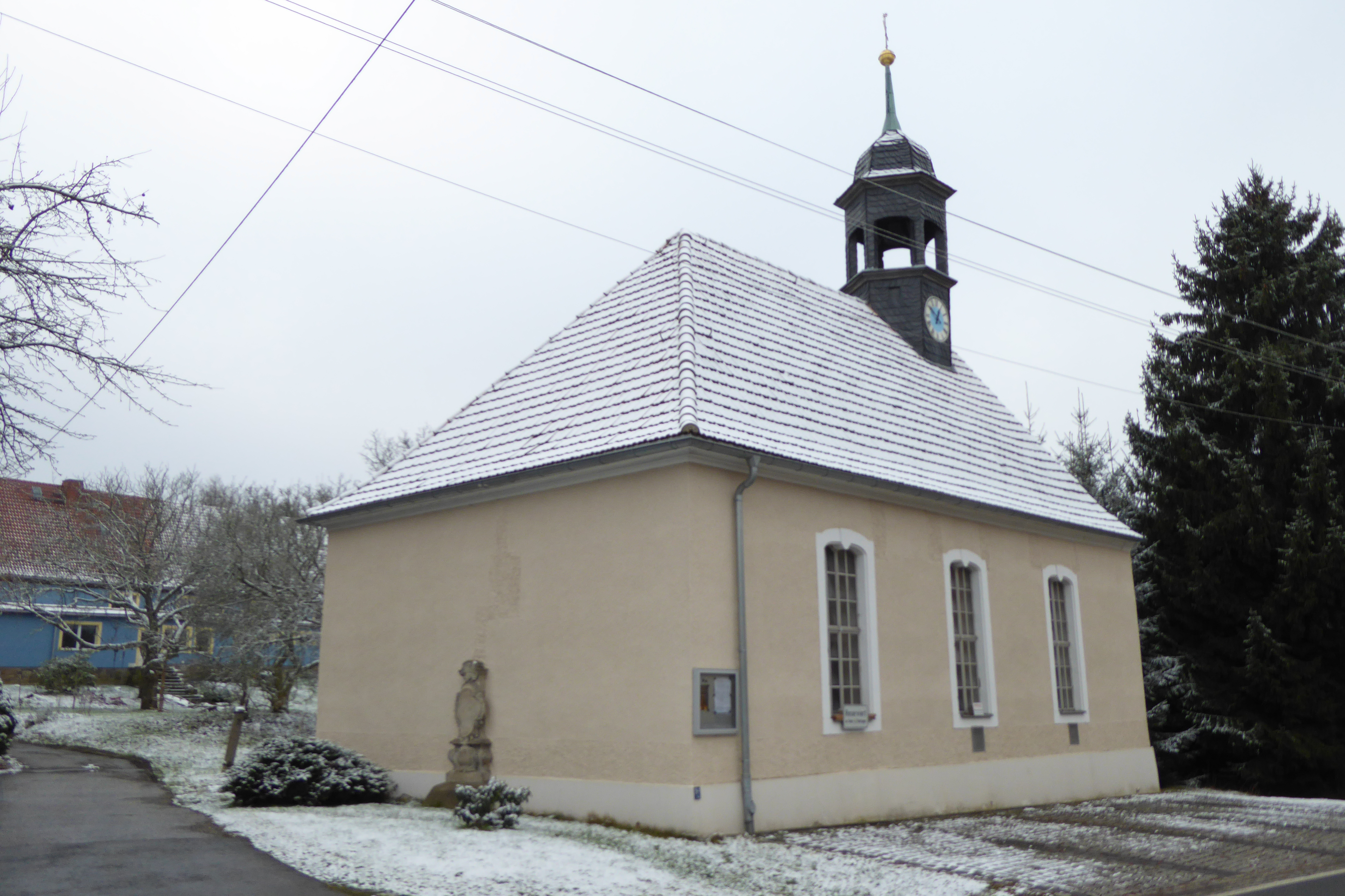 Denkmalgeschützte Kapelle in der Hühndorfer Straße in Sachsdorf in der Gemeinde Klipphausen